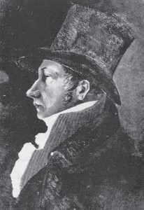 Jan Jeník z Bratřic (1756 - 1845), Český vlastenec a rakouský důstojník na portrétu od Antonína Brechtolda.